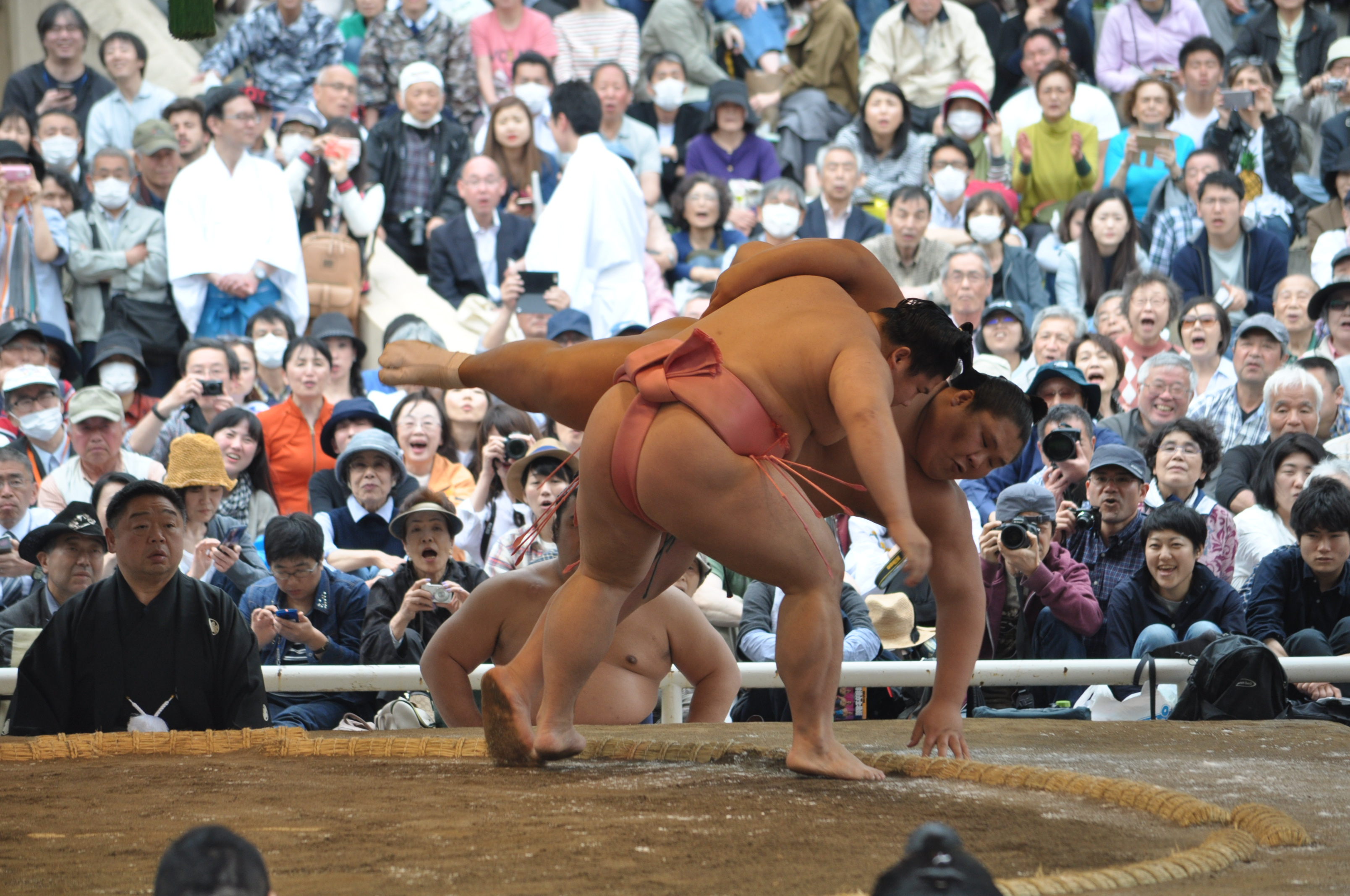 大翔丸 翔伍